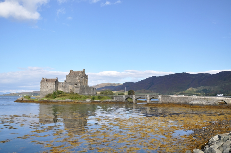 Eilean Donan Castle, wunderschön gelegen in den schottischen Highlands